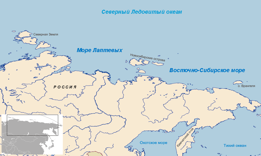 Восточно-Сибирское/Лаптевых море